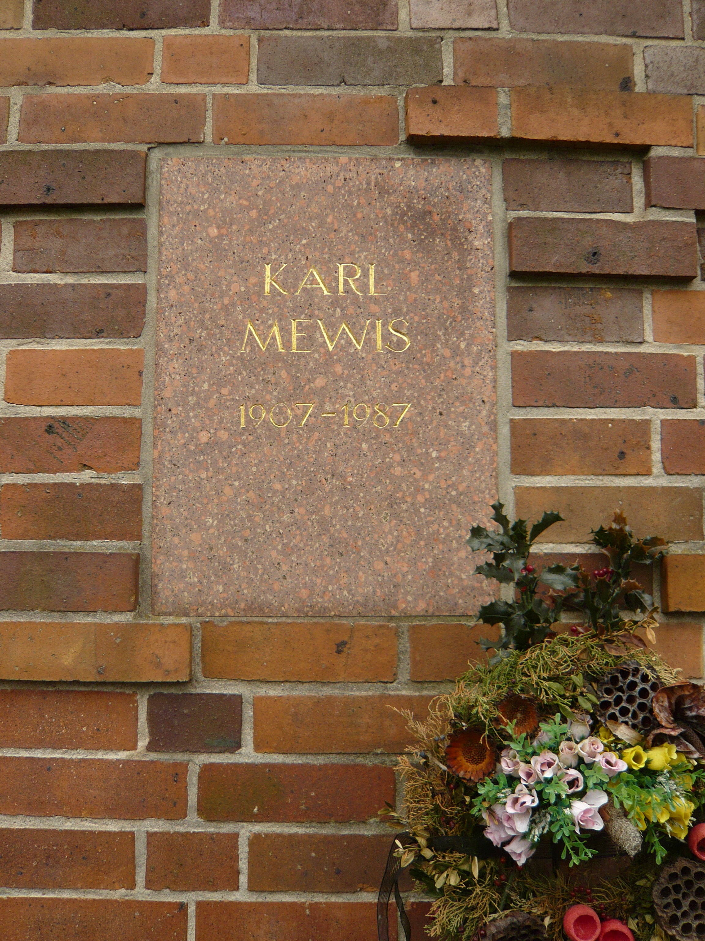 Grab auf dem Zentralfriedhof Friedrichsfelde